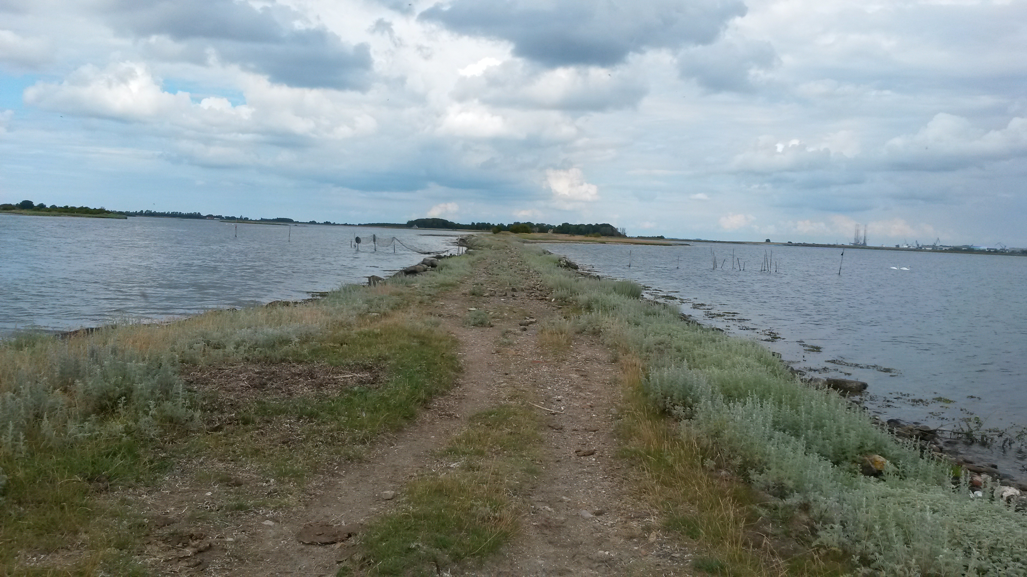 Stige Ø